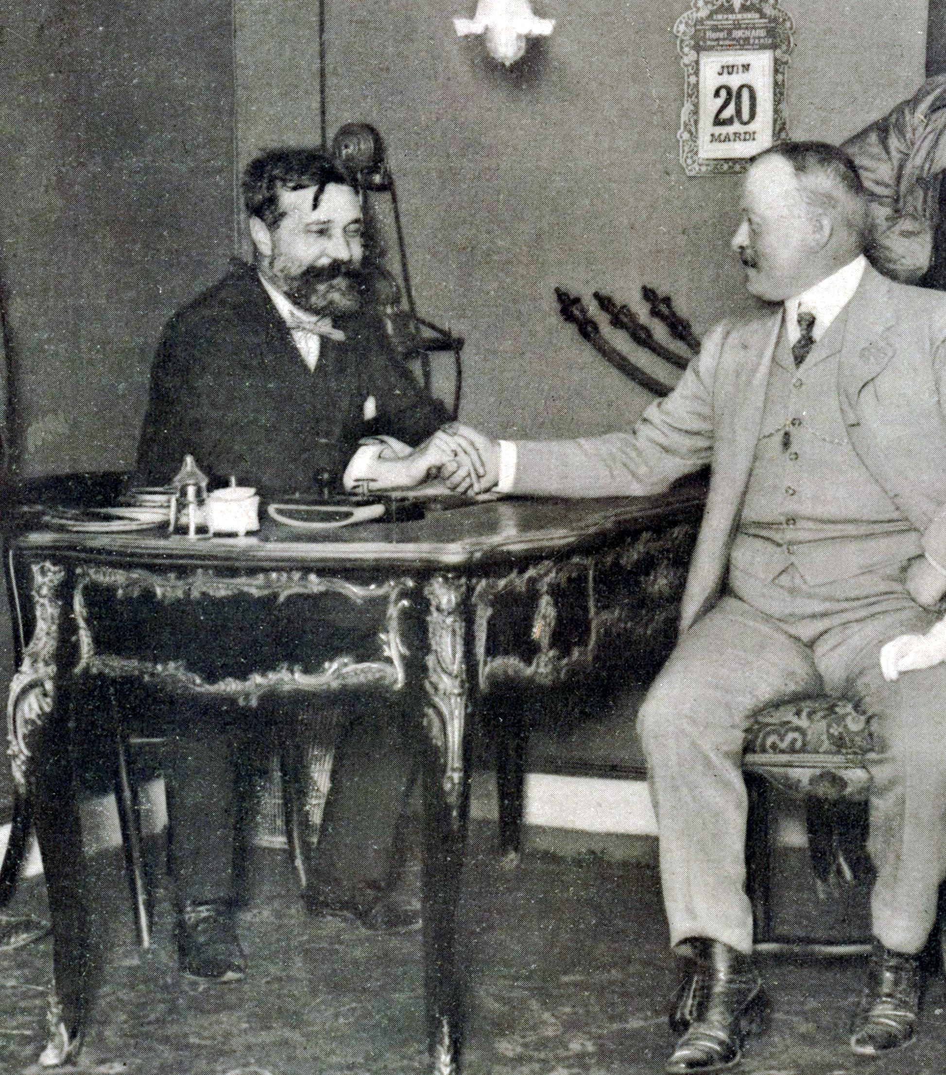 La Vie au Grand Air du 30 juin 1905, p.546